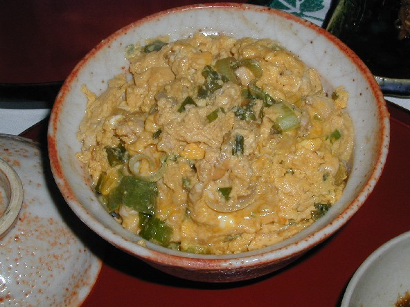 Donburi La foto è stata scattata da me a Roma (Italia) il 9.5.2004 Categoria:Immagini di cucina e alimenti